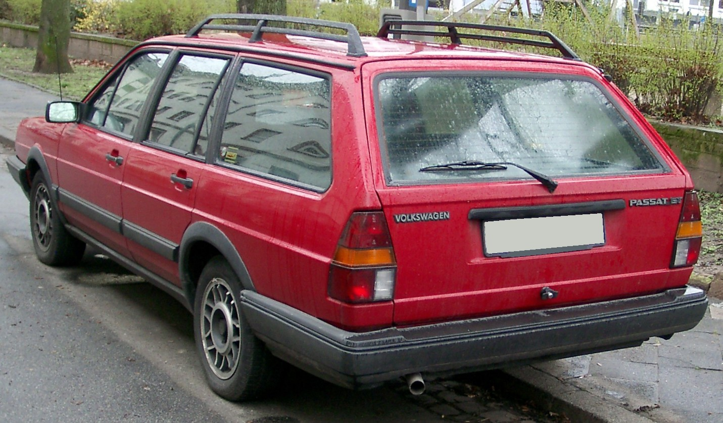 VW Passat B2 Variant